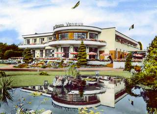 kopkjh